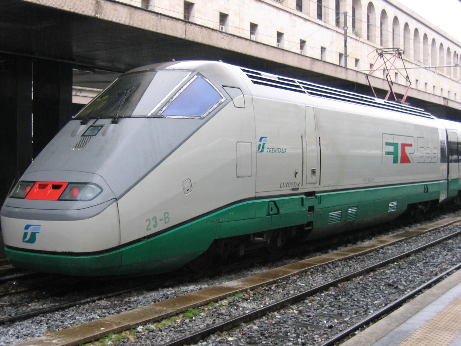 ETR500 monotensione E404-23B in Roma Termini train station.